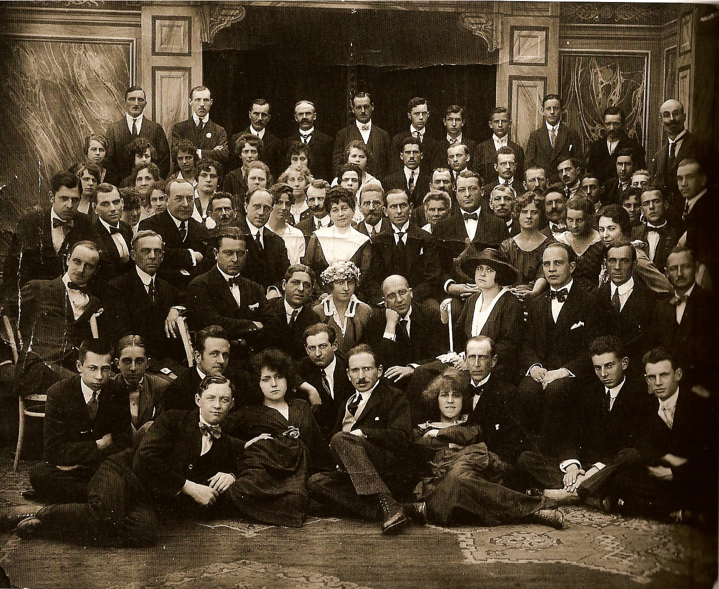 Mitarbeiter der Wiener Kunstfilm-Industrie. Zeitpunkt der Aufnahme unbekannt. (zwangsläufig zwischen 1911 (Umbenennung in "Wiener Kunstfilm-Industrie") und 1919 (Neugründung als "Vita-Film")